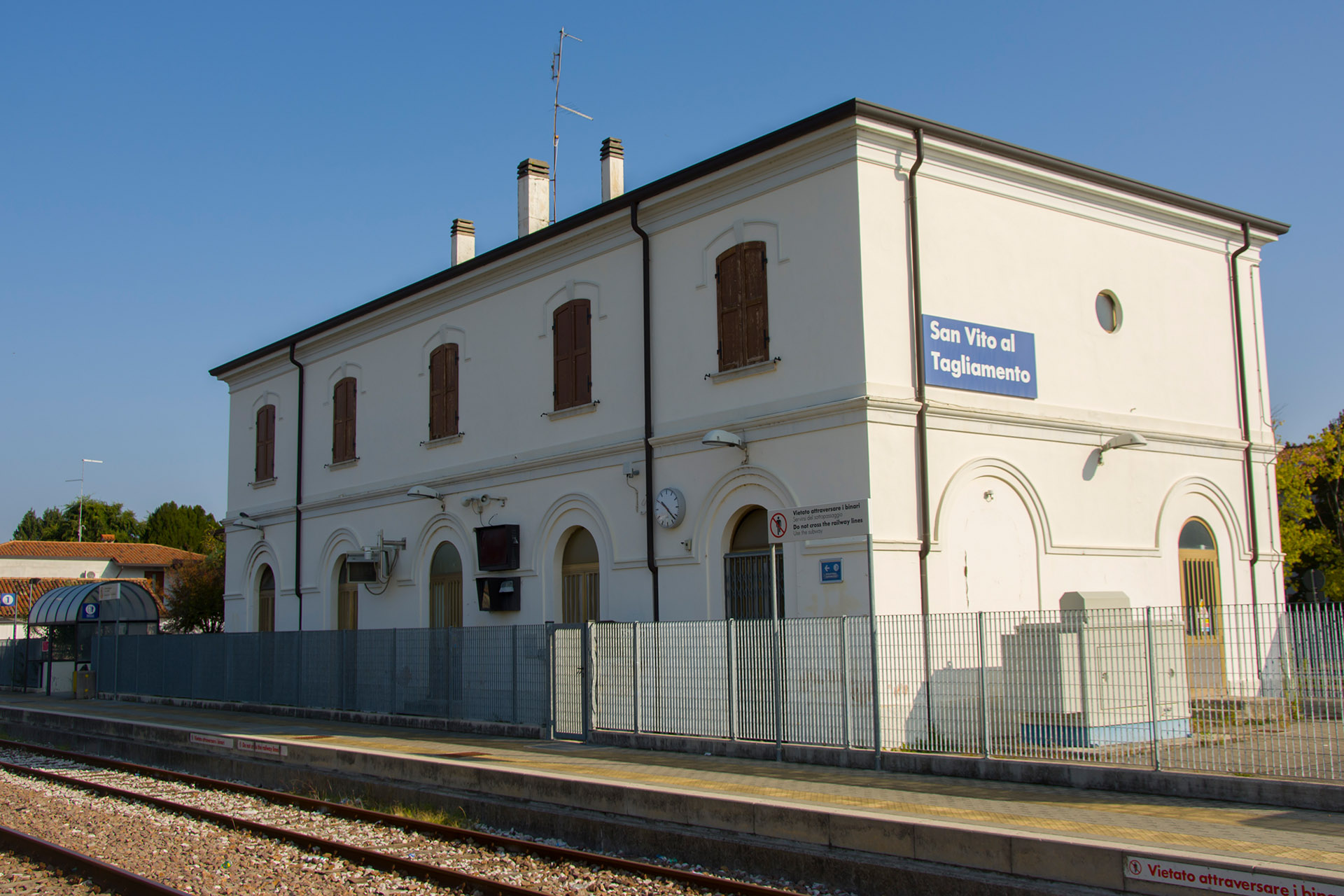 Interno della stazione ferroviaria di San Vito Al Tagliamento